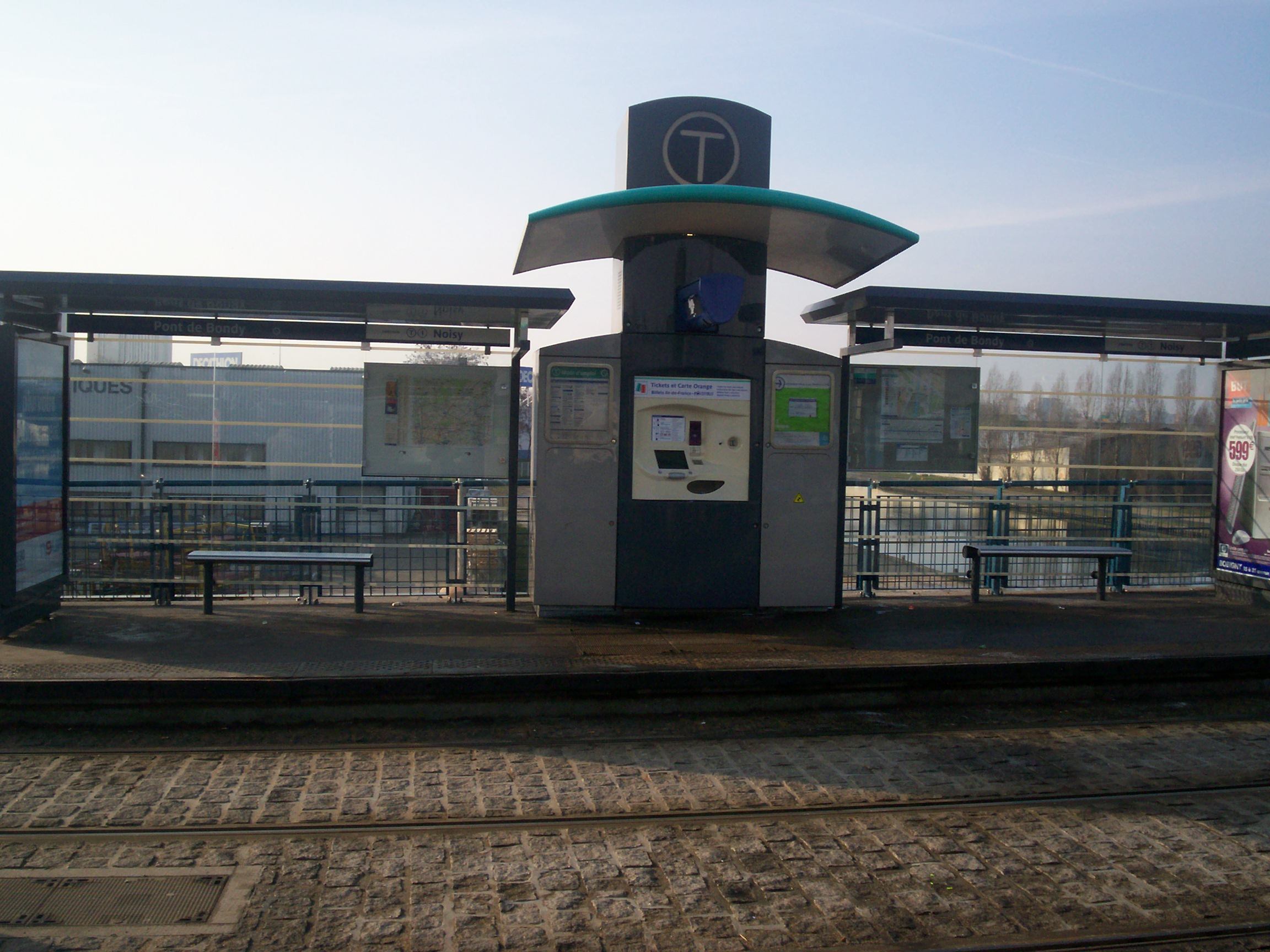 Abri Voyageurs Station T1 RATP "Pont de Bondy"